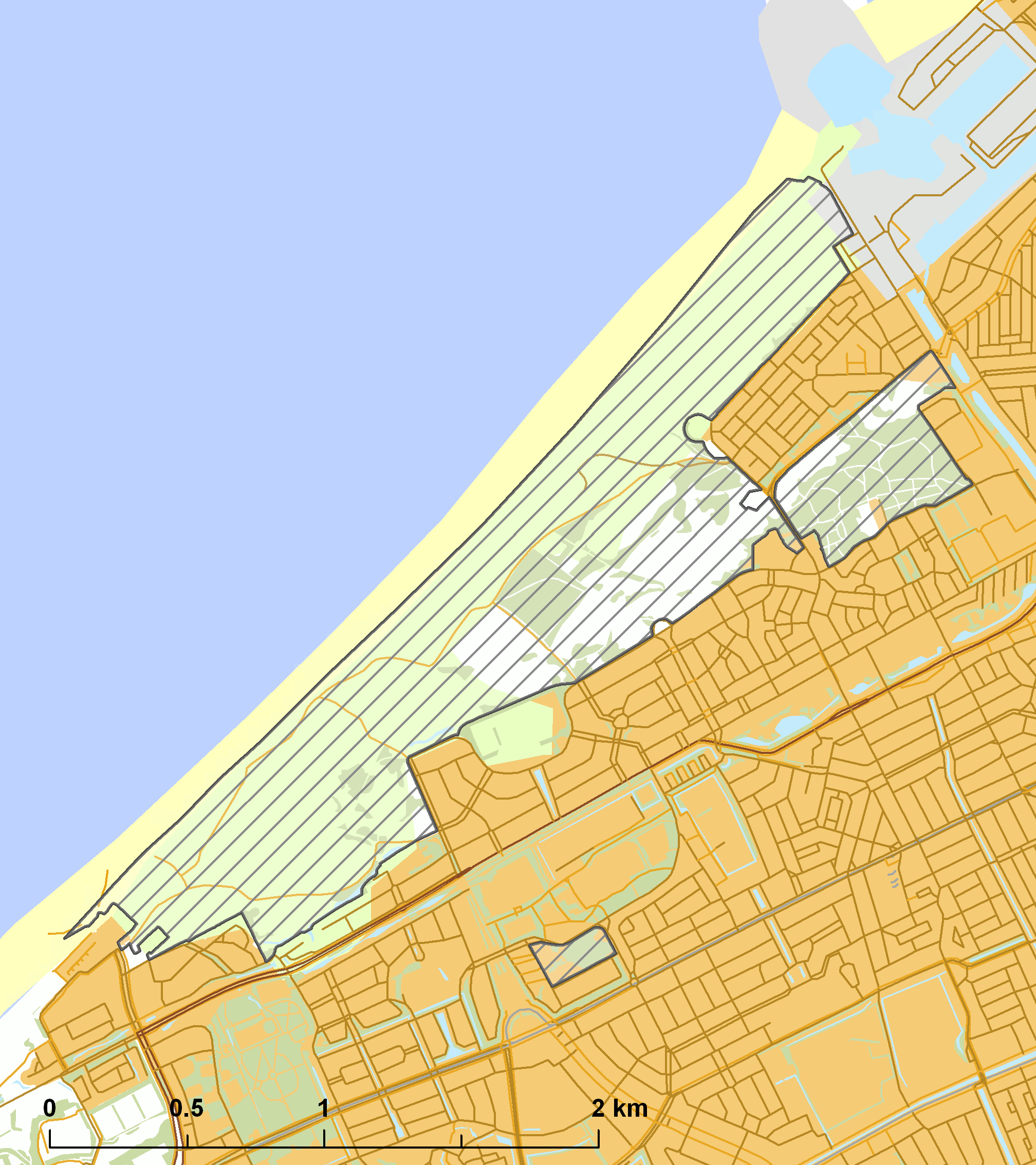 Natura2000 - Westduinpark & Wapendal.png